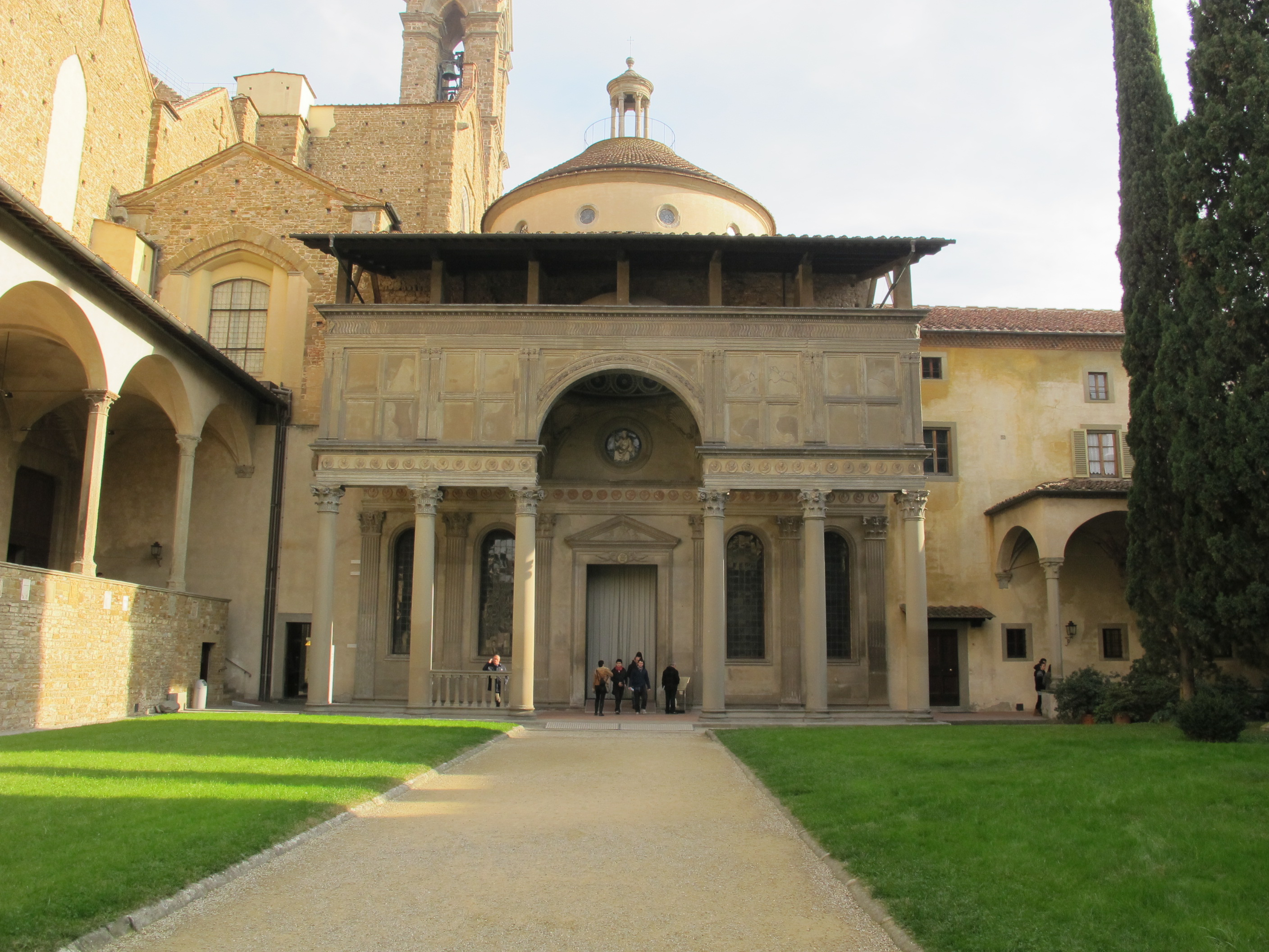 S. croce, cappella dei pazzi